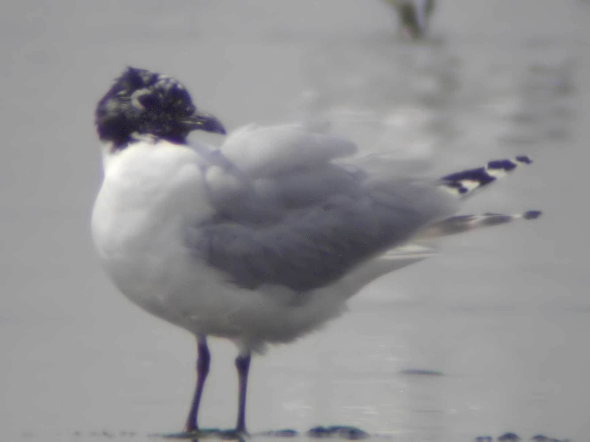 Saunders's Gull Chroicocephalus saundersi, Mai Po, Hong Kong.